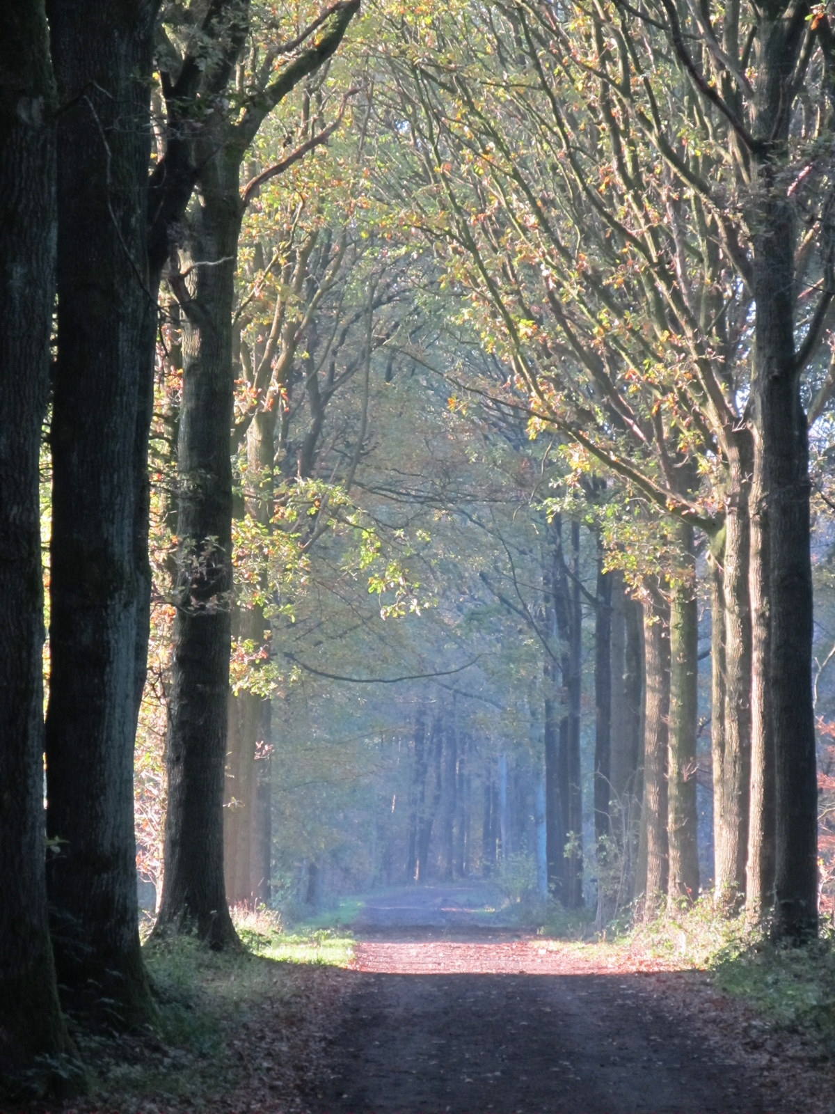 20111120 Drongengoedbos